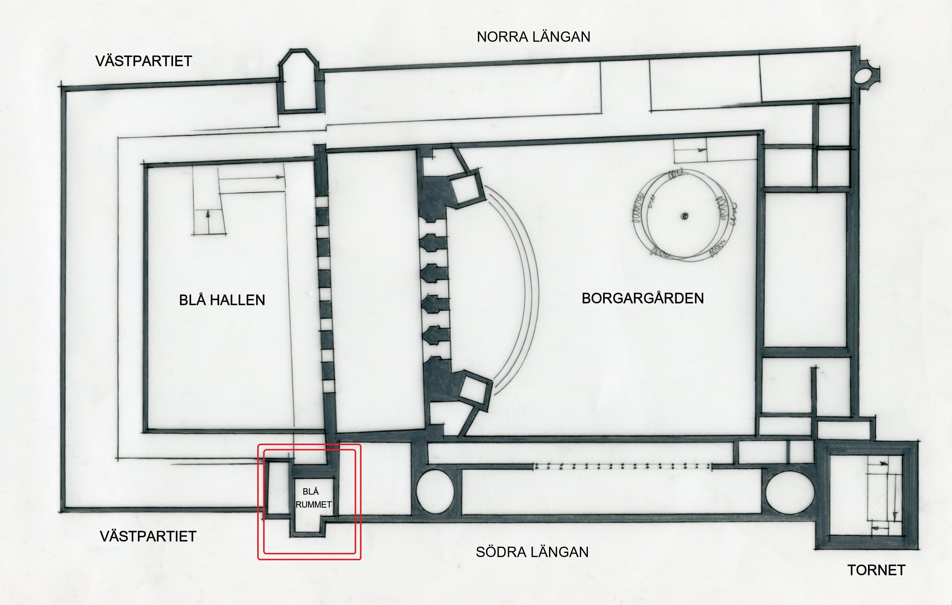 Stockholms stadshus översiktsplan våning 1 trappa